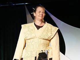 Jocasta Nu